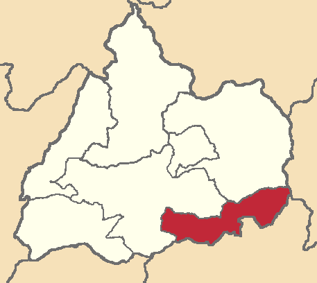 Mapa localizador del cantón en Cotopaxi, Ecuador